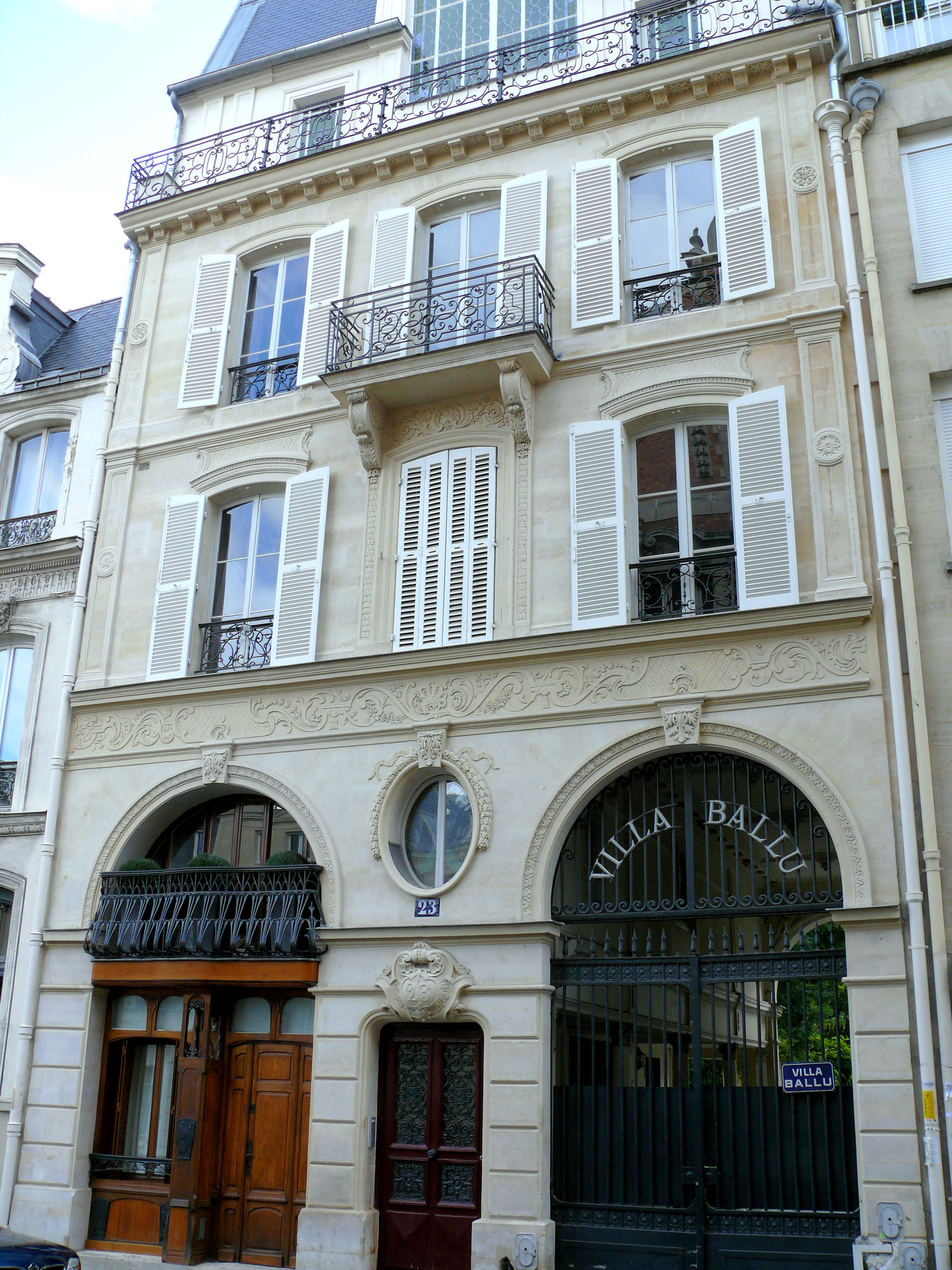 Paris 9ème arrondissement - Villa Ballu